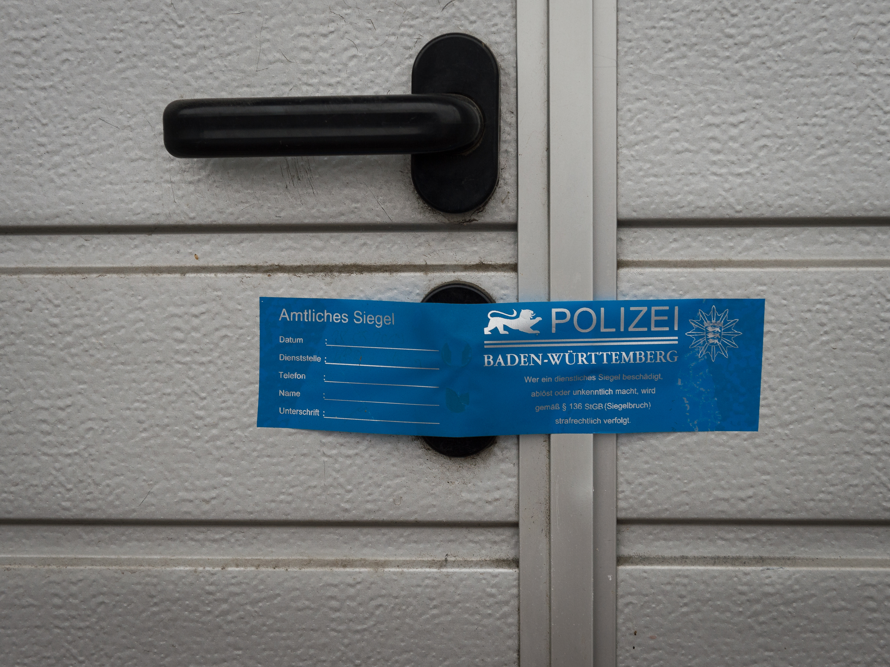 Siegel der Polizei Baden-Württemberg an der Schlupftür eines Rolltors im Gebäude Heinrich-Röhm-Straße 6 in 89567 Sontheim an der Brenz.